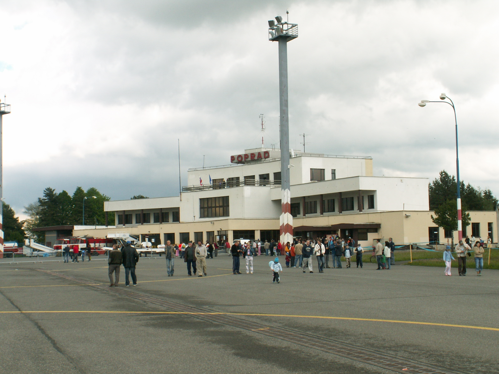 Pohľad na terminál letiska Poprad-Tatry